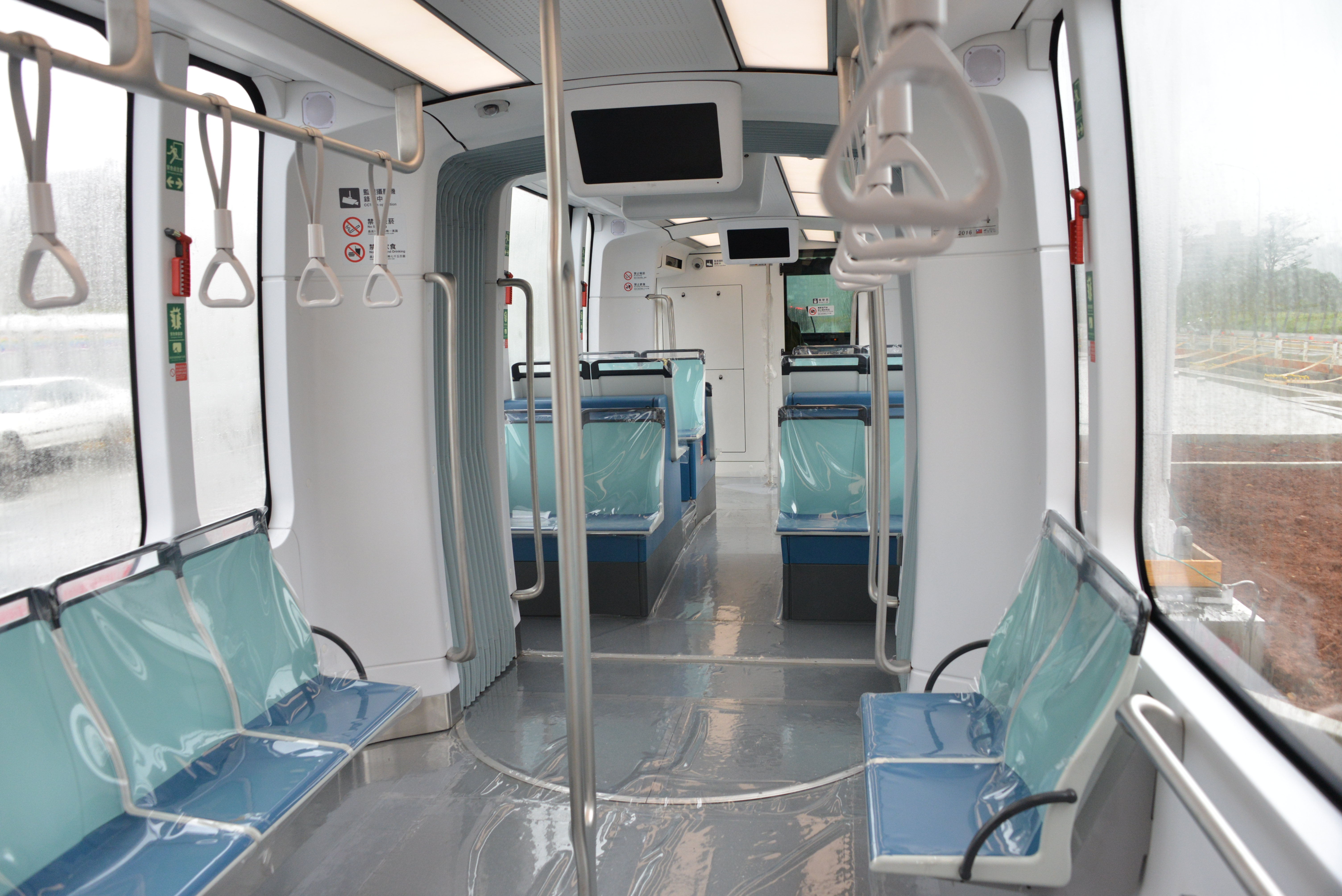 中文（台灣）: 淡海輕軌列車內裝